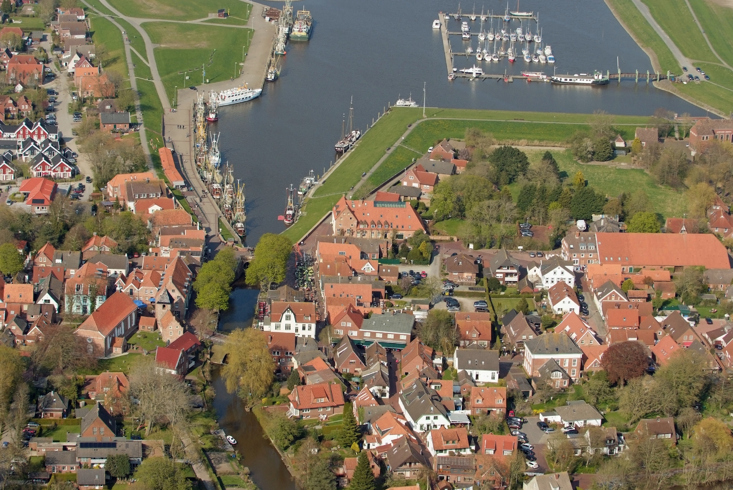 Greetsiel Fotoflug von Nordholz-Spieka nach Oldenburg und Papenburg